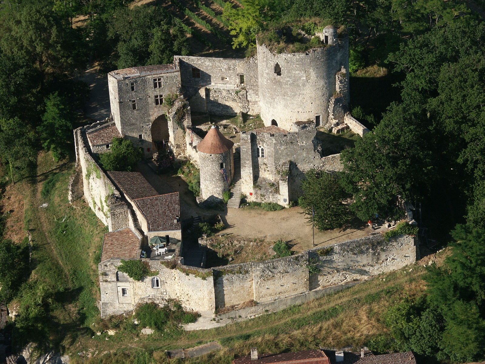 Vue aérienne sur la château de Langoiran